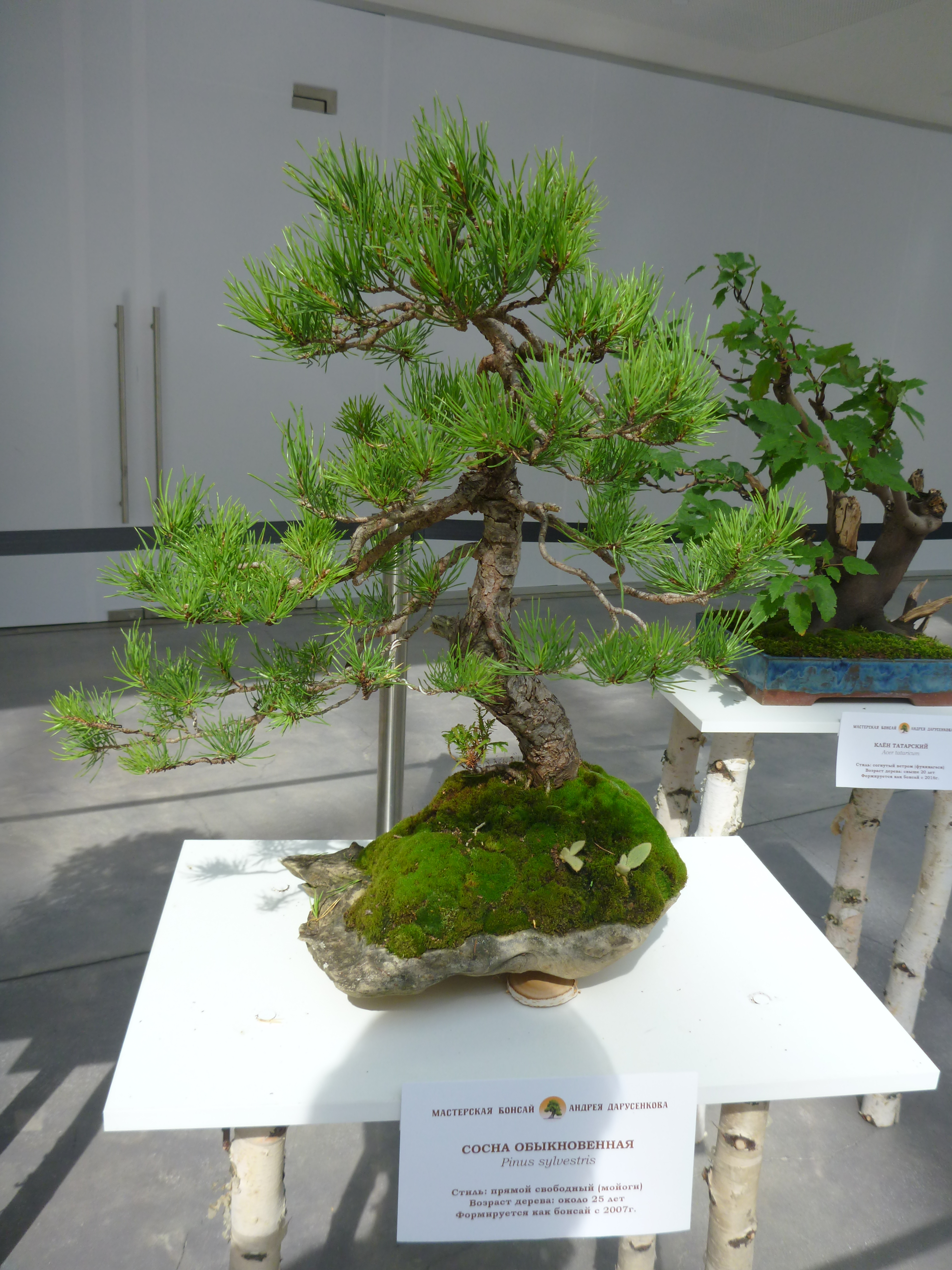 Сосна обыкновенная бонсай в Ельцин-центре 2019 год